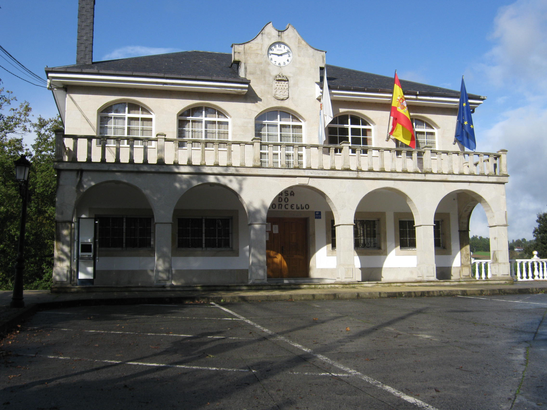 Imaxe da fachada da casa do concello de Santiso, A Coruña